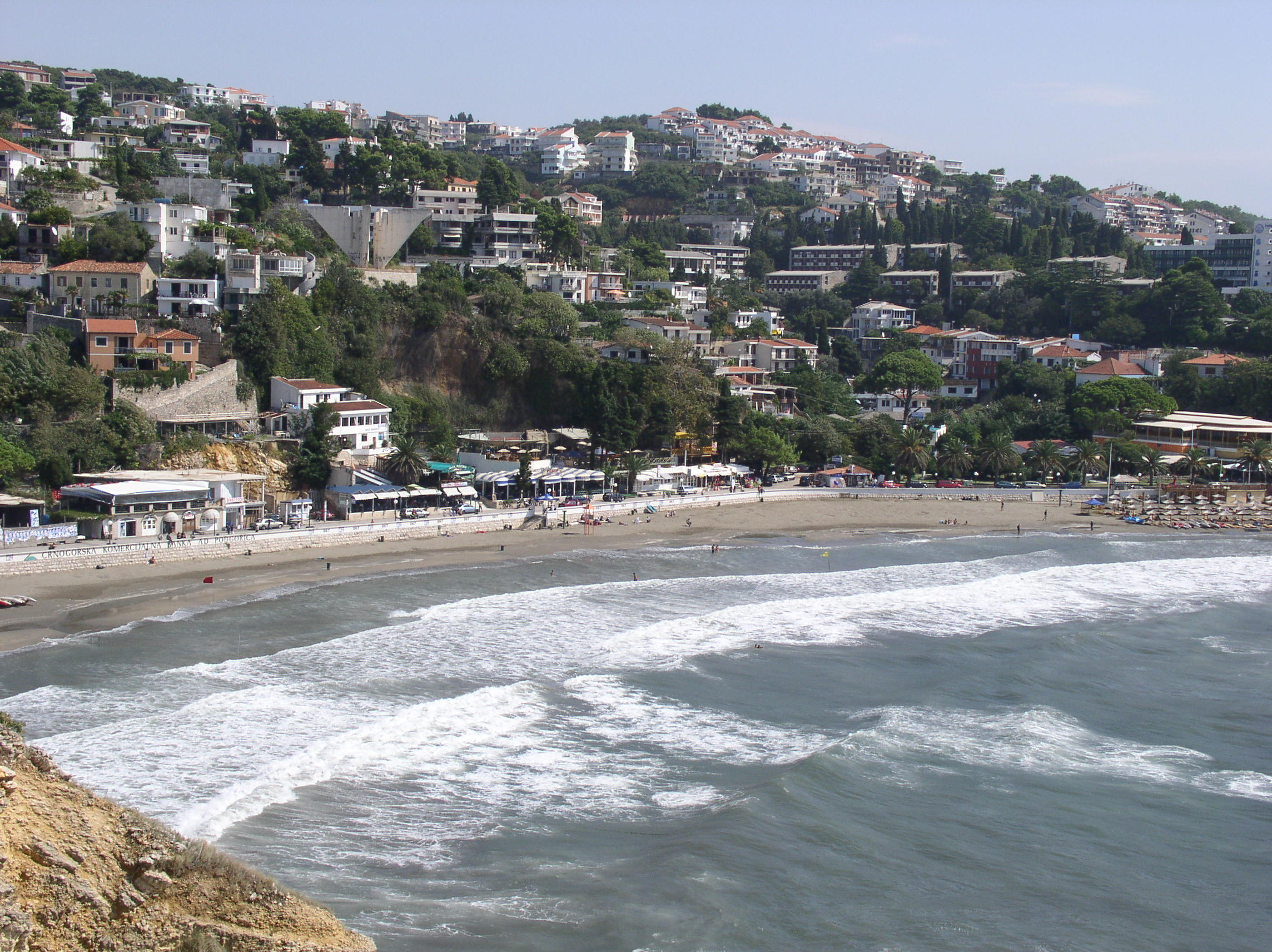 Улцињ - поглед са тврђаве ову фотографију сам лично направио Licensing